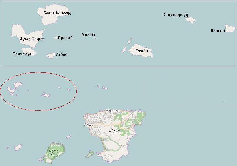 Διαπόριοι Νήσοι